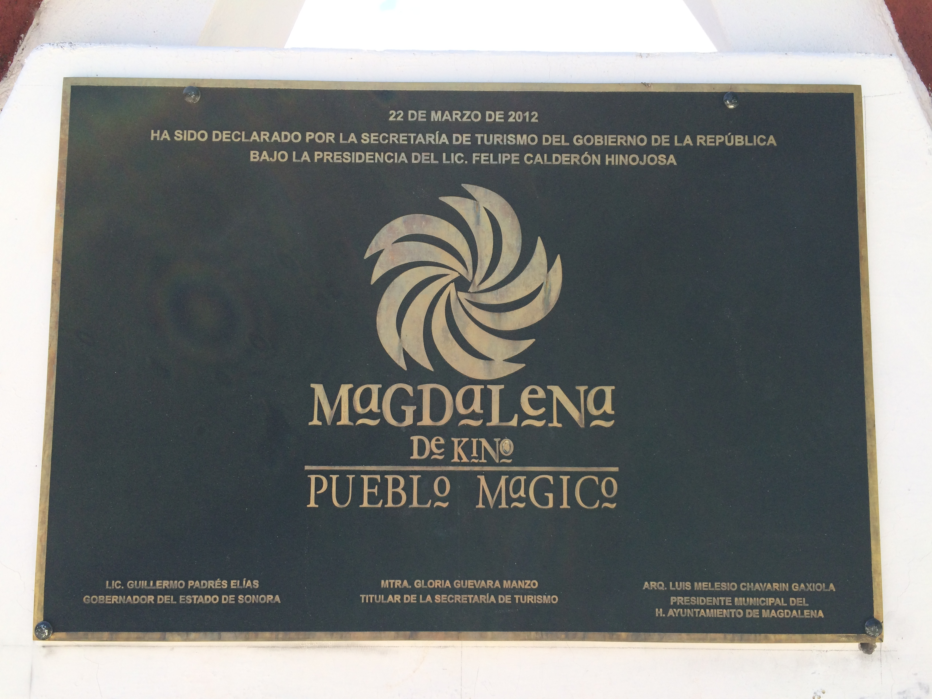 La placa que oficializa a Magdalena de Kino con el programa nacional de Pueblo Mágico en México.